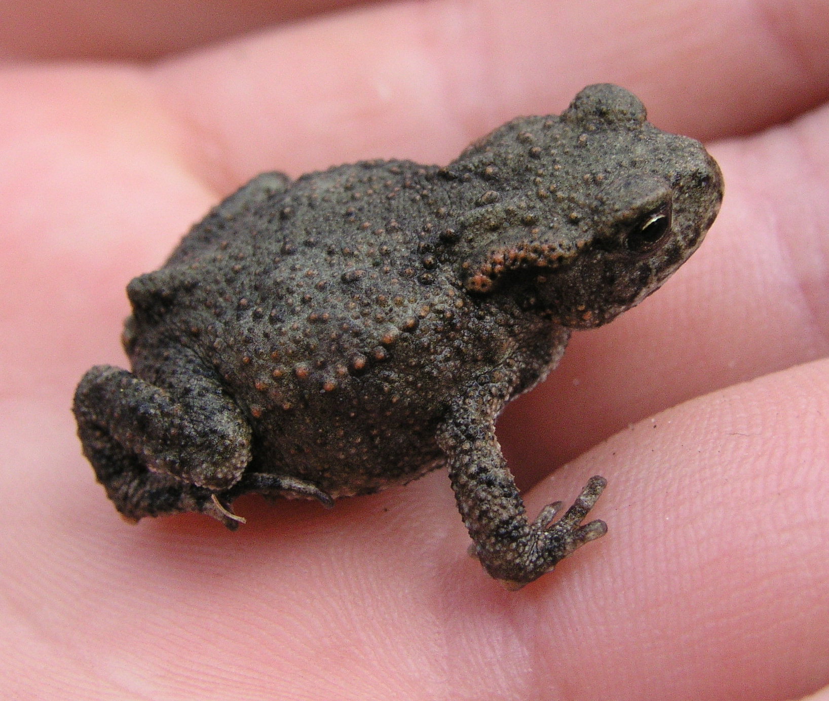 young Bufo bufo, eigen foto e van herk 2004 GNU FDL